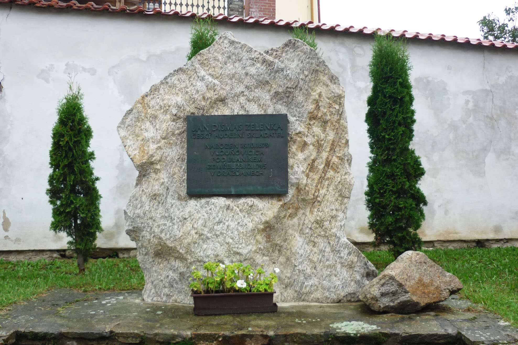 Denkmal für den Komponisten Jan Dismas Zelenka in Launowitz (Louňovice pod Blaníkem)